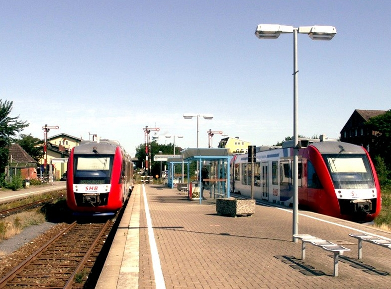 RE bei Ronneburg